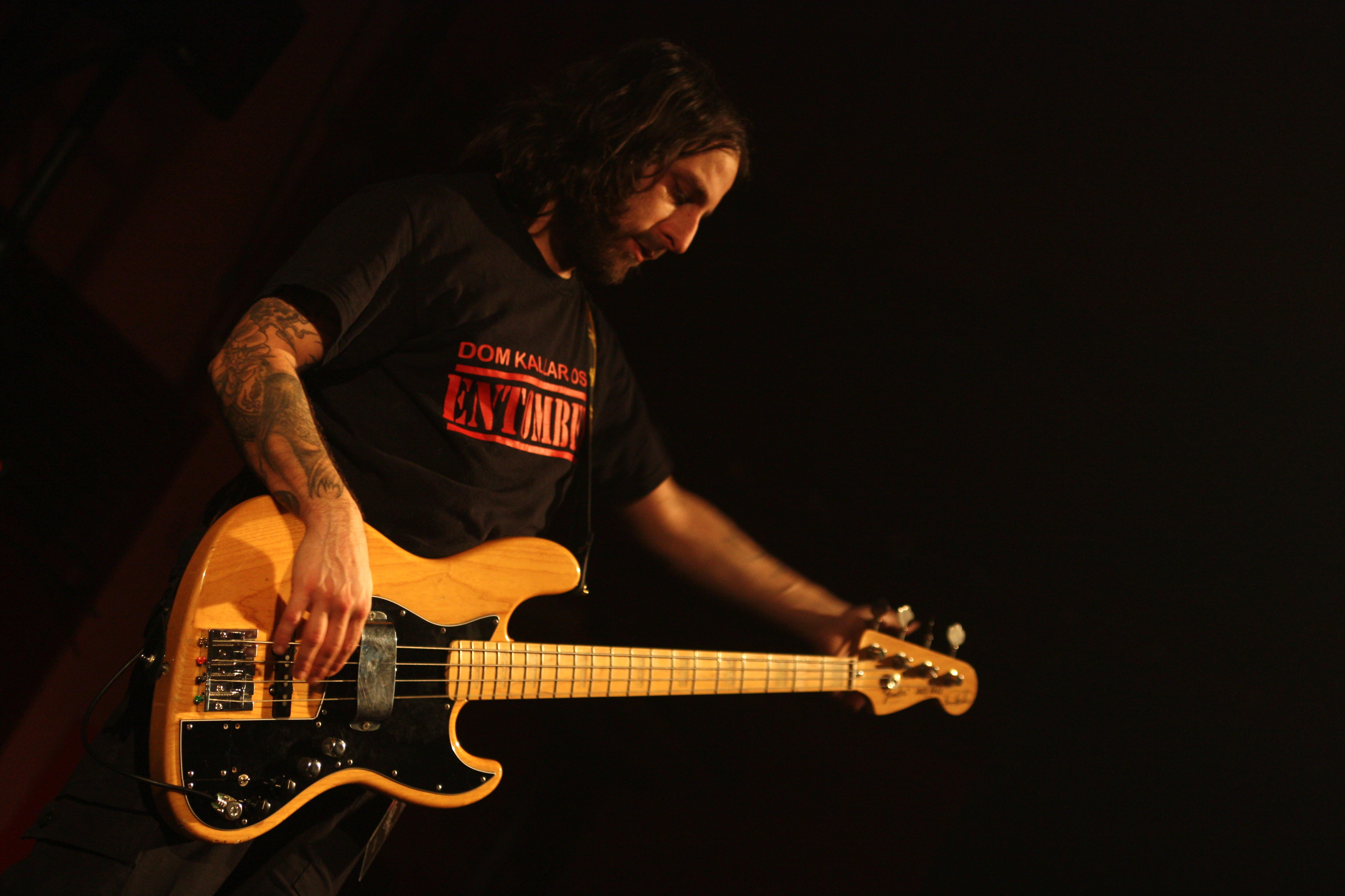 Tomada en El Raval, Barcelona. Picture taken at El Raval, Barcelona on december 3, 2008.